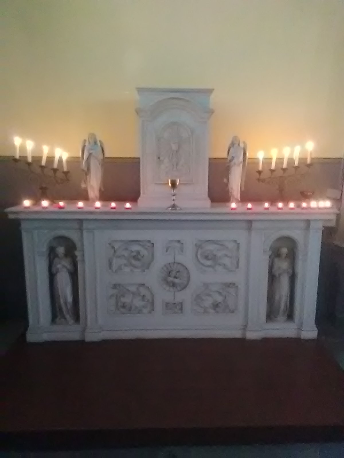 Eglise de Brunémont